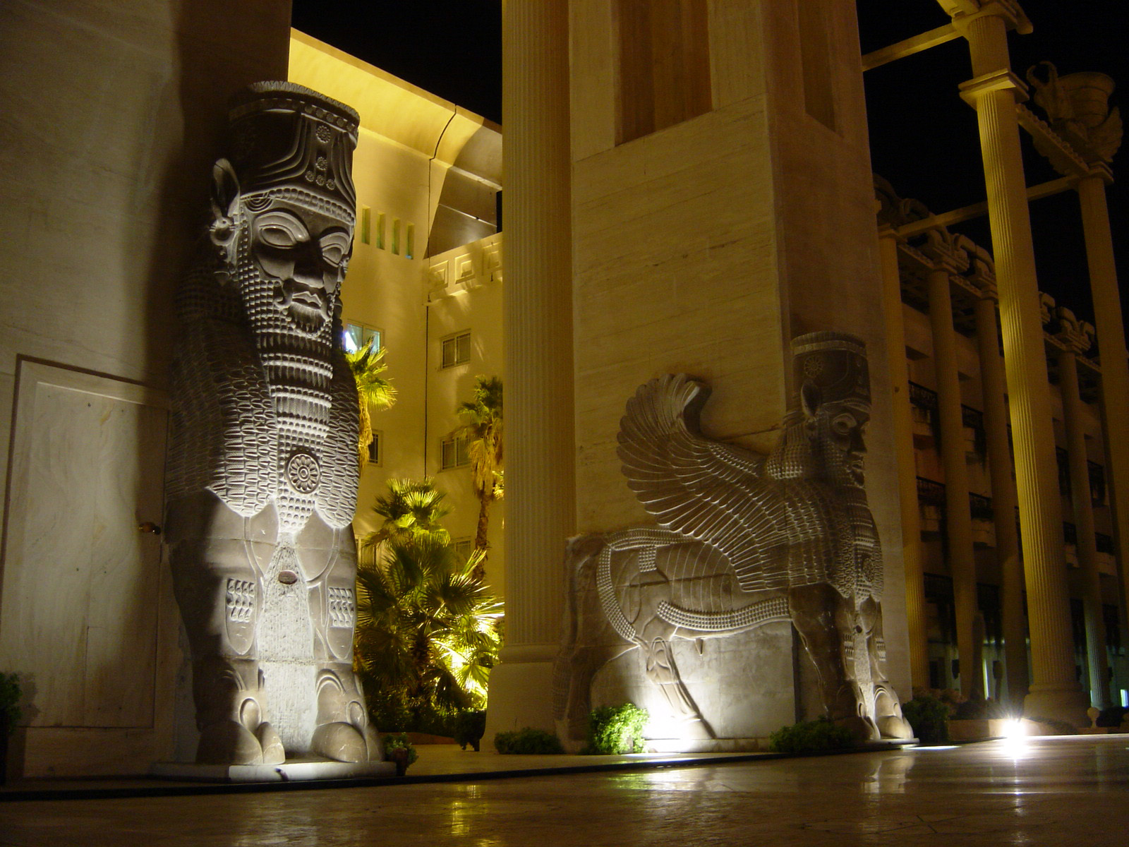 Dariush(Darius) Grand Hotel